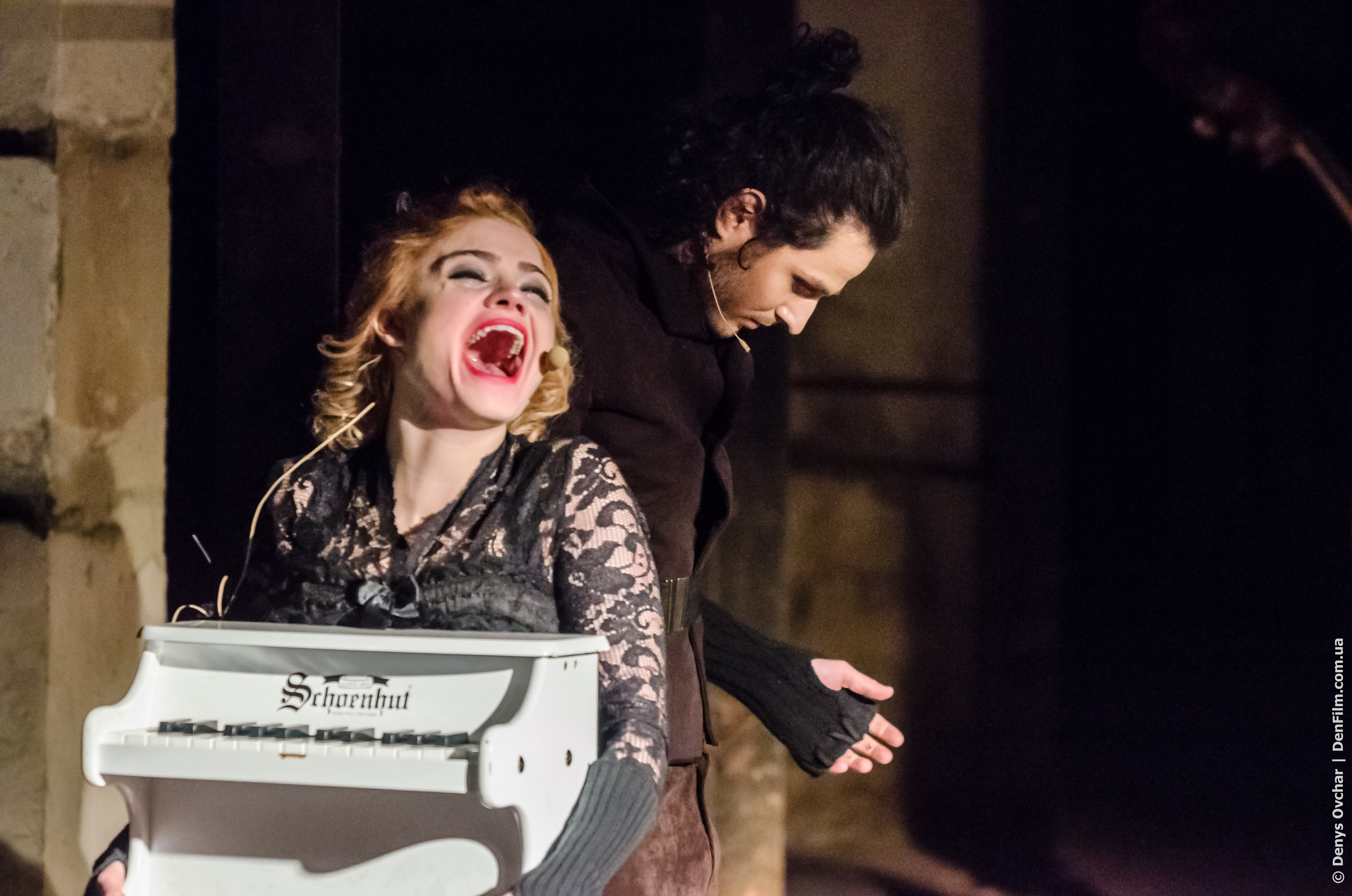 Ірма Вітовська в ролі Гертруди. Неоопера-жах Гамлет